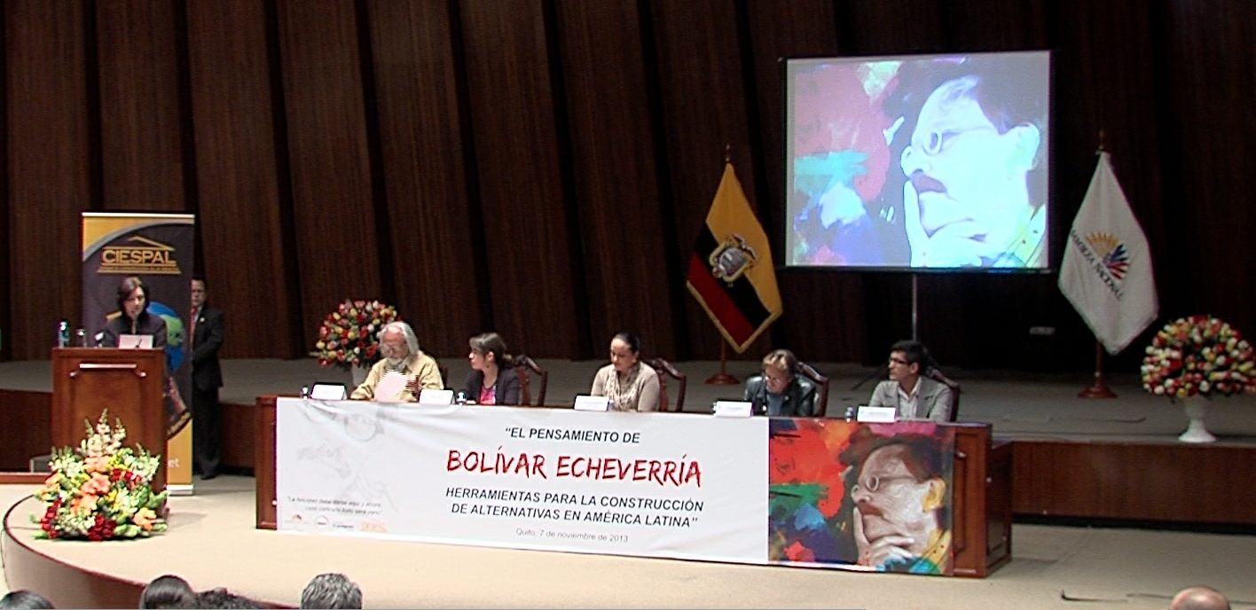 7 de Noviembre de 2013